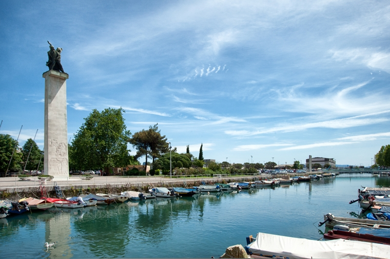 Spomenik oslobođenja, akademskog kipara Vinka Matkovića s reljefima akademskog slikara Raoula Goldonija i dalje Most hrvatskih branitelja iz Domovinskog rata